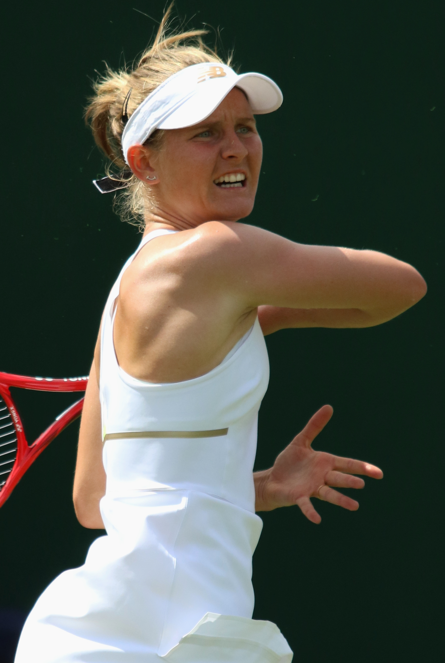 Ferro WM19 (1)